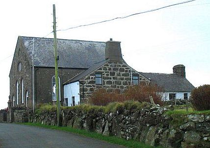 Nebo Independent chapel and chapel house, Y Rhiw